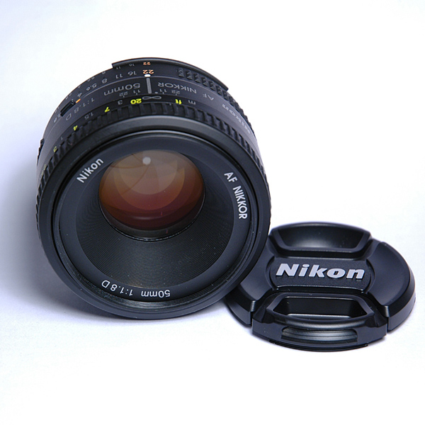 AF Nikkor 50mm f1.8 "Standard" Lens